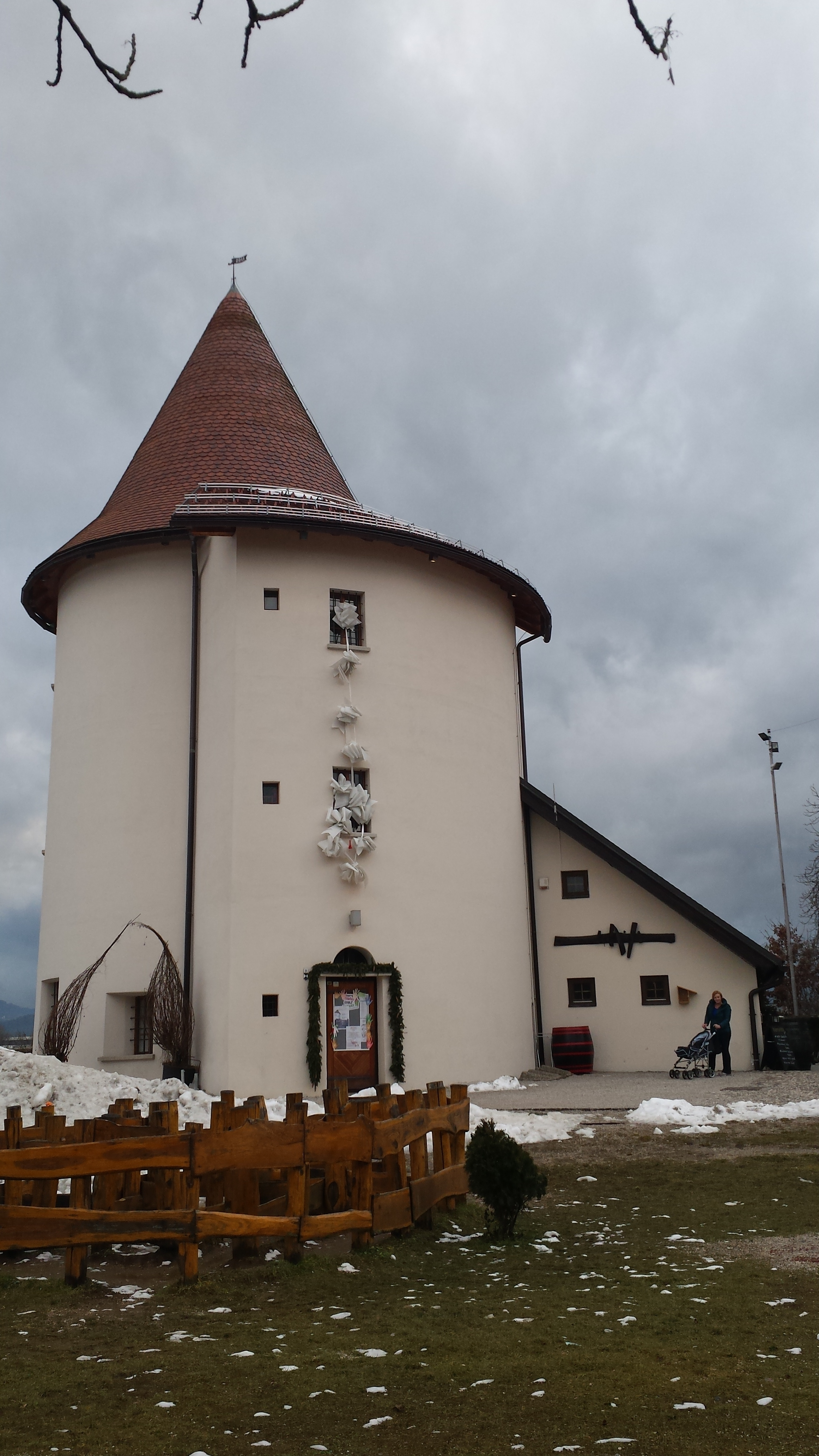 Obrambni stolp Pungert. Kranj. Avtor: M. Mravlja